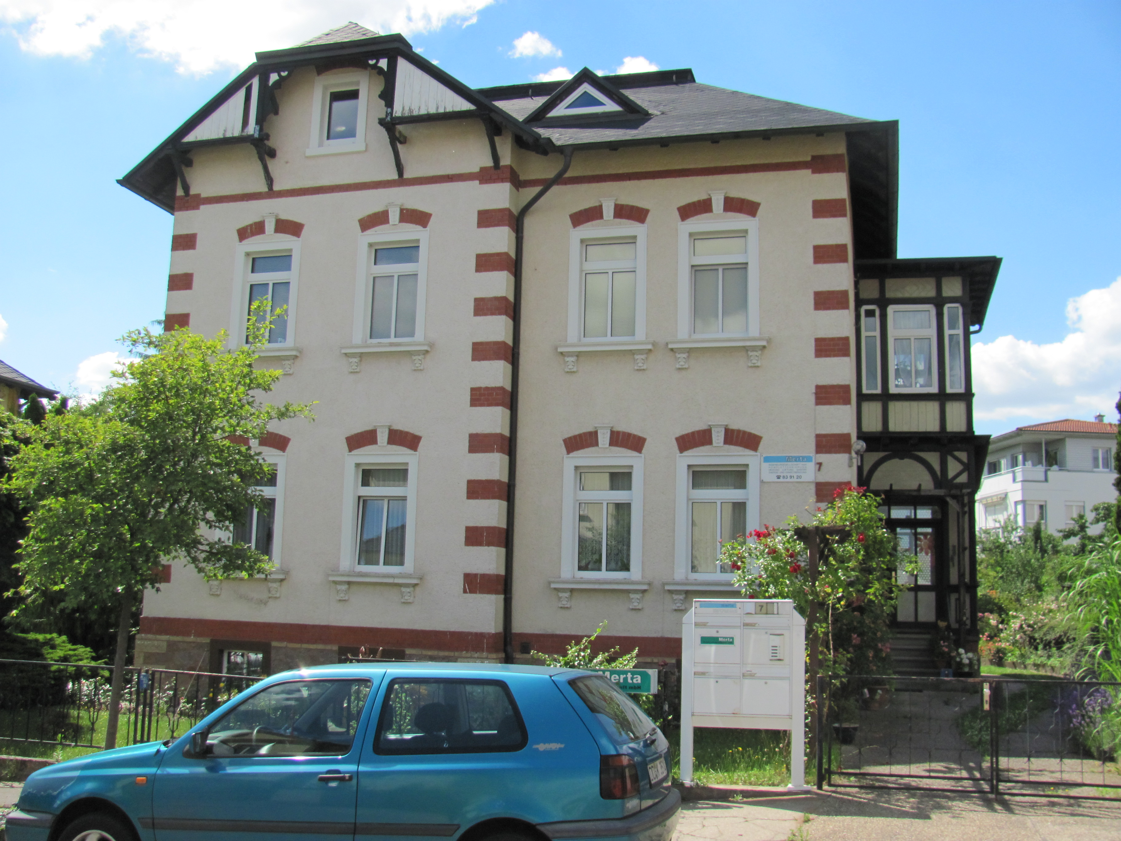 Fehlende Kulturdenkmale nach Wikipedialiste in Heinrich-Heine-Straße, Horst-Vieth-Straße, Humboldtstraße, Dr-Rudolf-Friedrichstraße